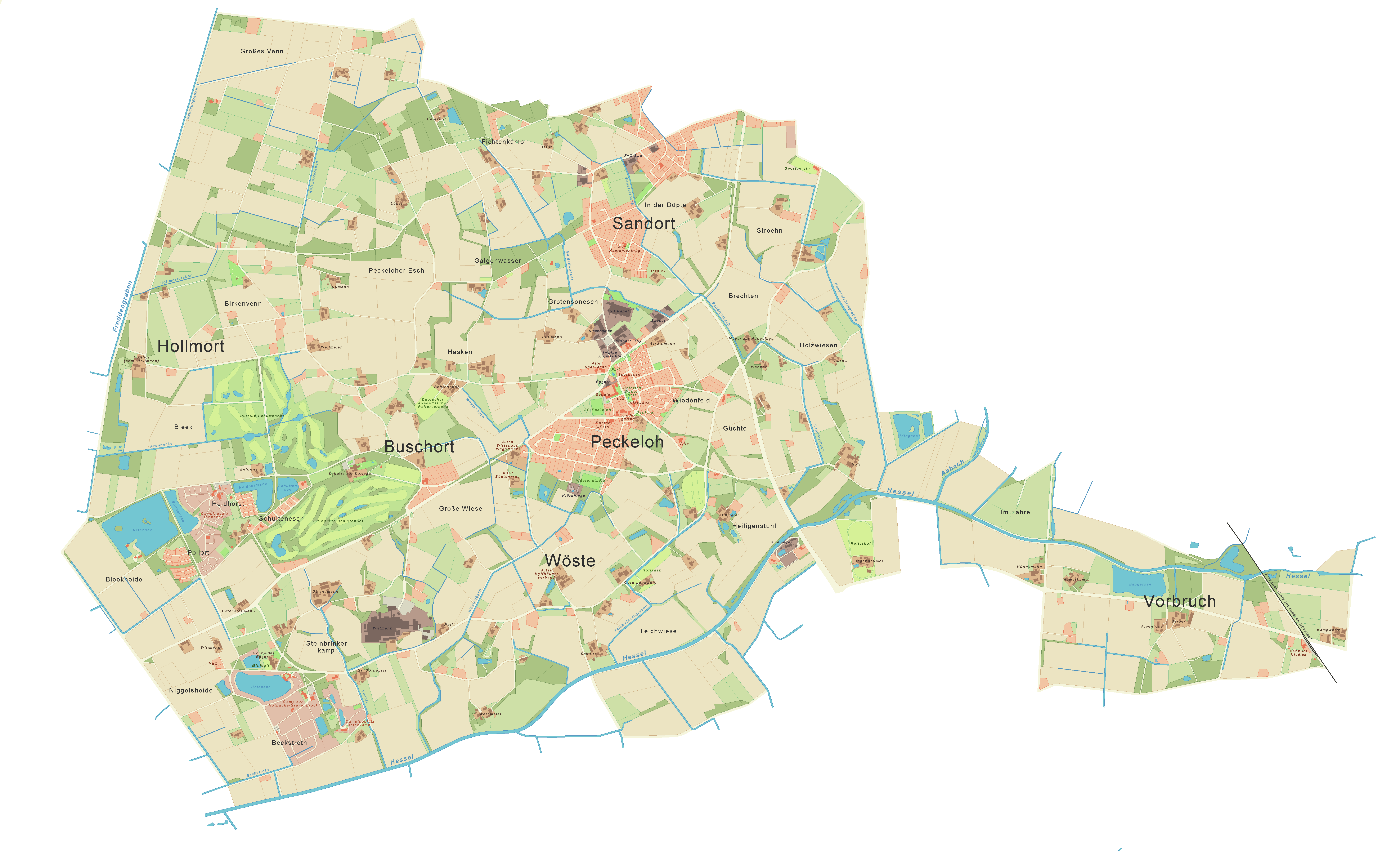 Peckeloh, mit seinen Naturräumen und Siedlungen.